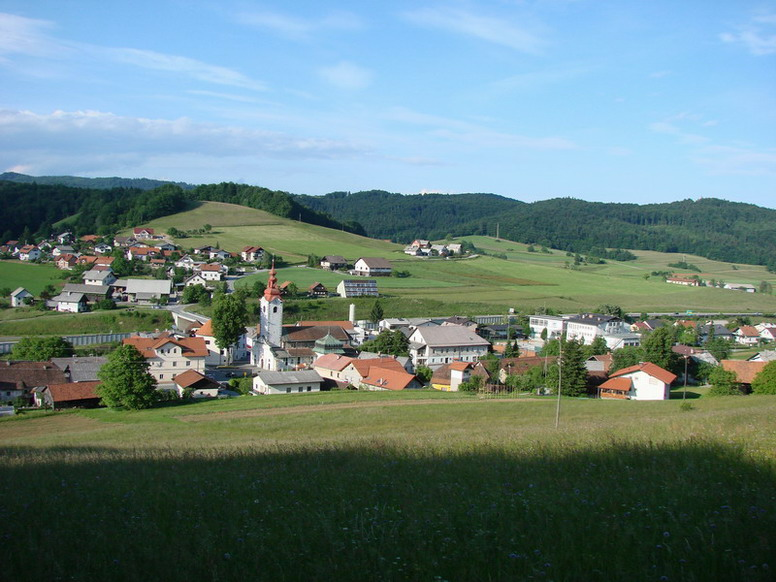 Zahodna stran Šmarja - Sap